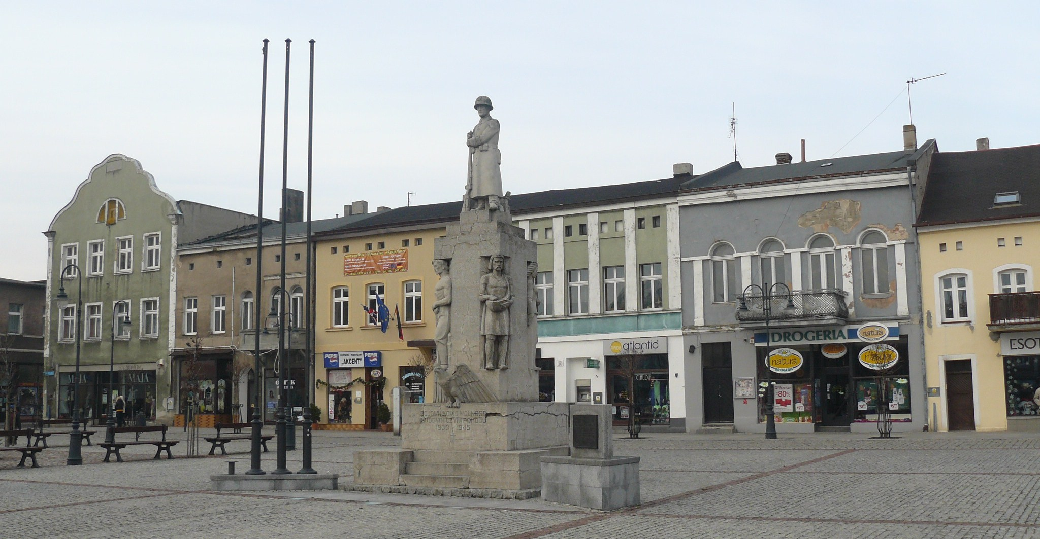 Wąbrzeźno - rynek.